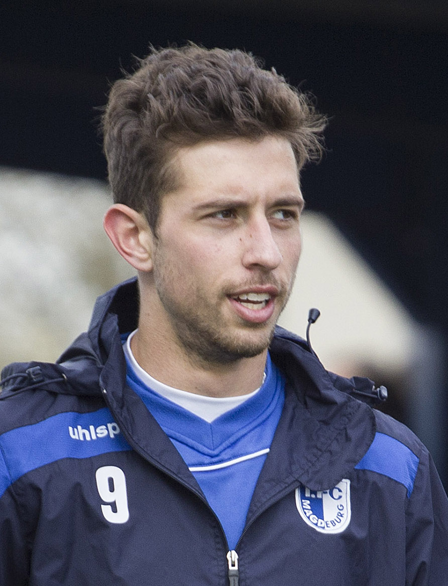 Manuel Farrona-Pulido